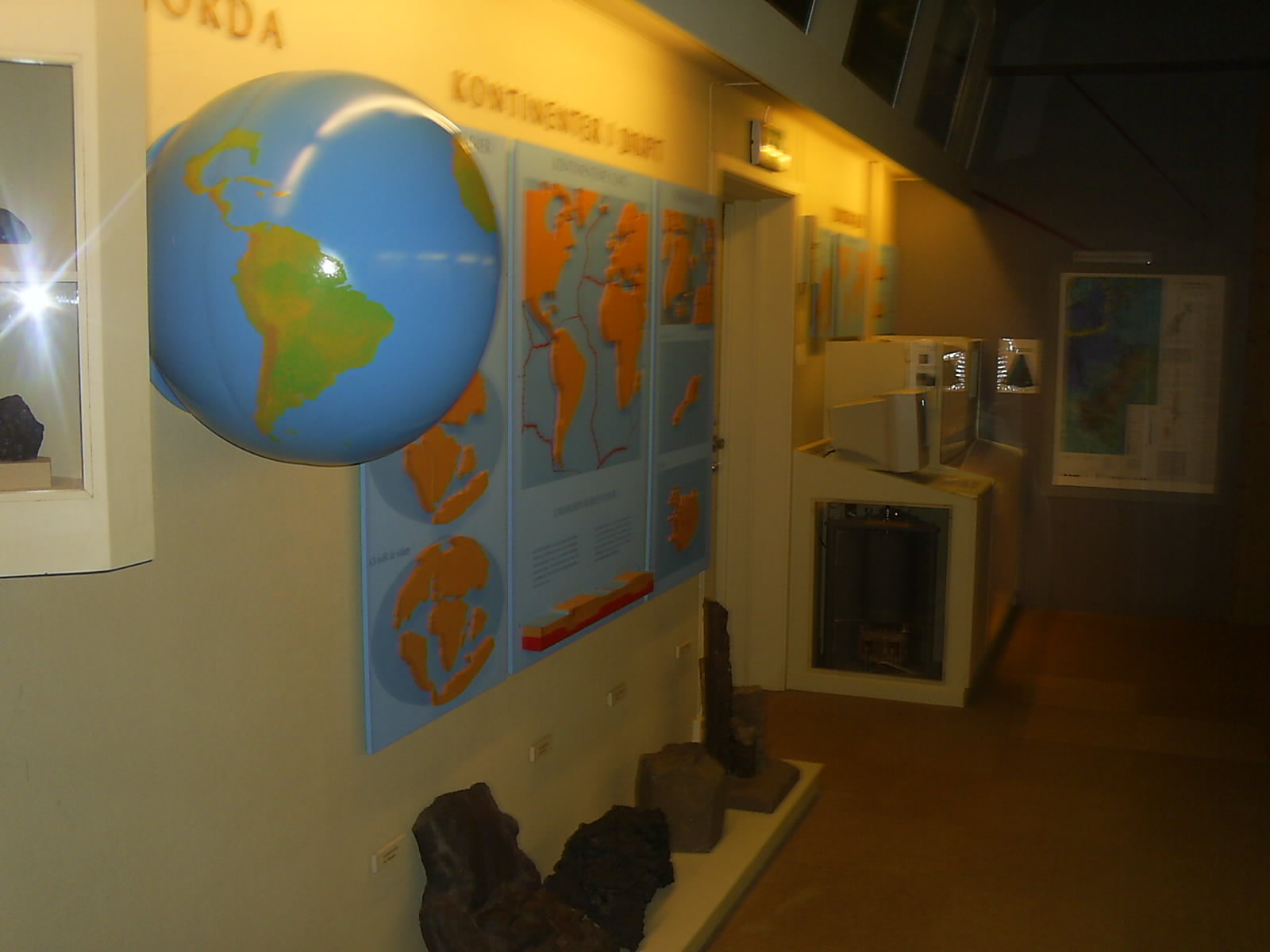 Sala de geología del museo universitario de Tromsø